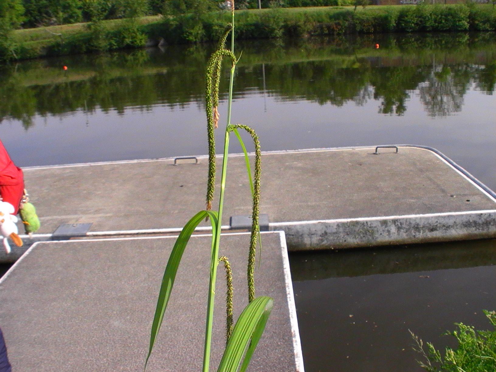 Carex pendula (Laîche pendante)